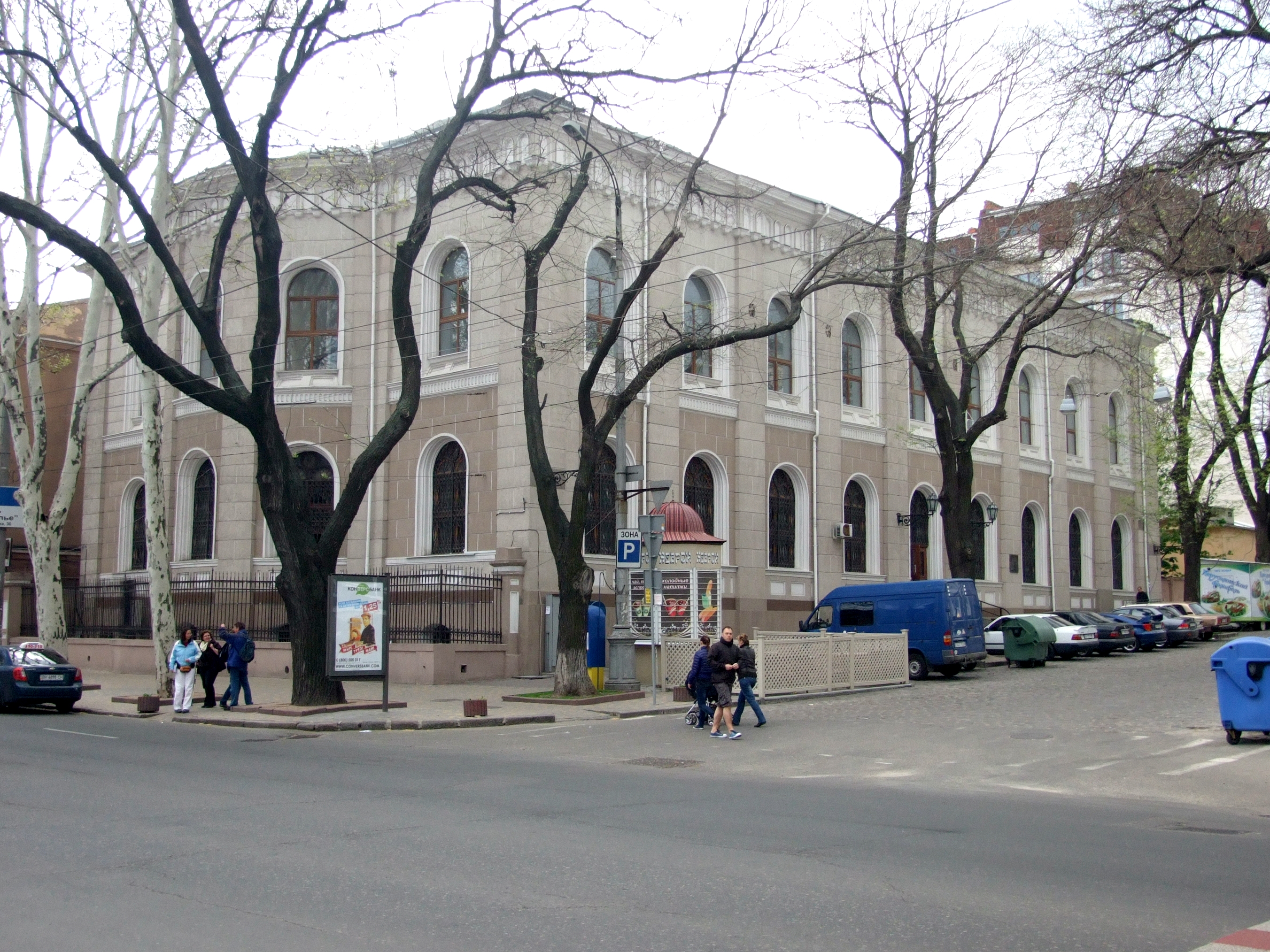 Будівля синагоги, 1846 рік, 1850 – 1853 роки